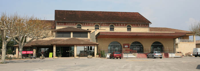 Village of Caromb, "coopérative", Vaucluse, France